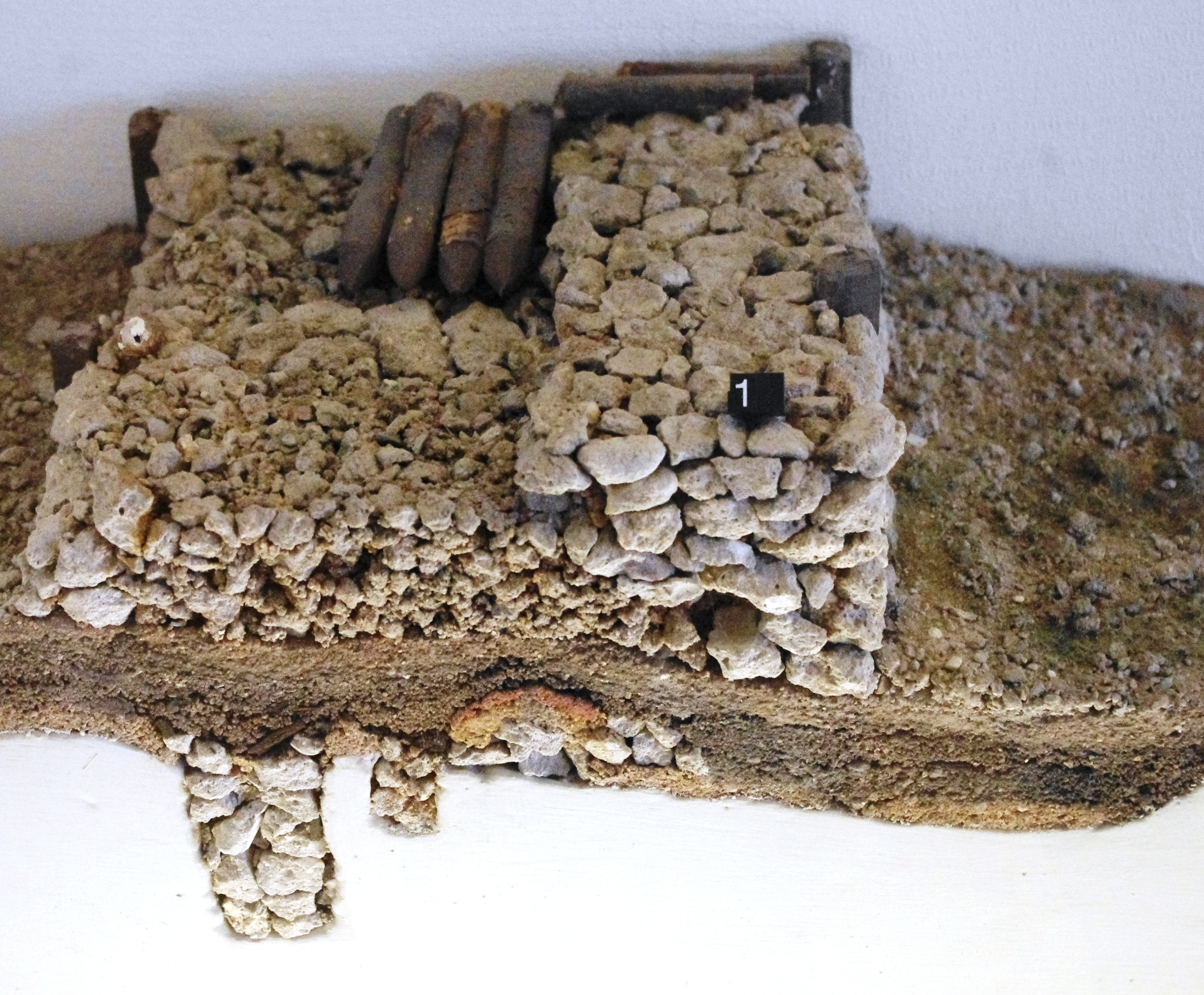 mur de l'éperon barré du Britzgyberg (Hallstatt D)